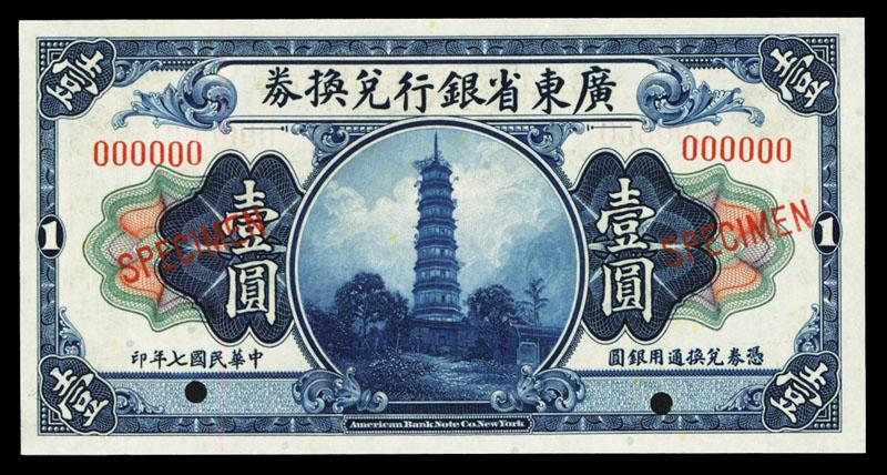 廣東省銀行壹圓銀圓兌換券